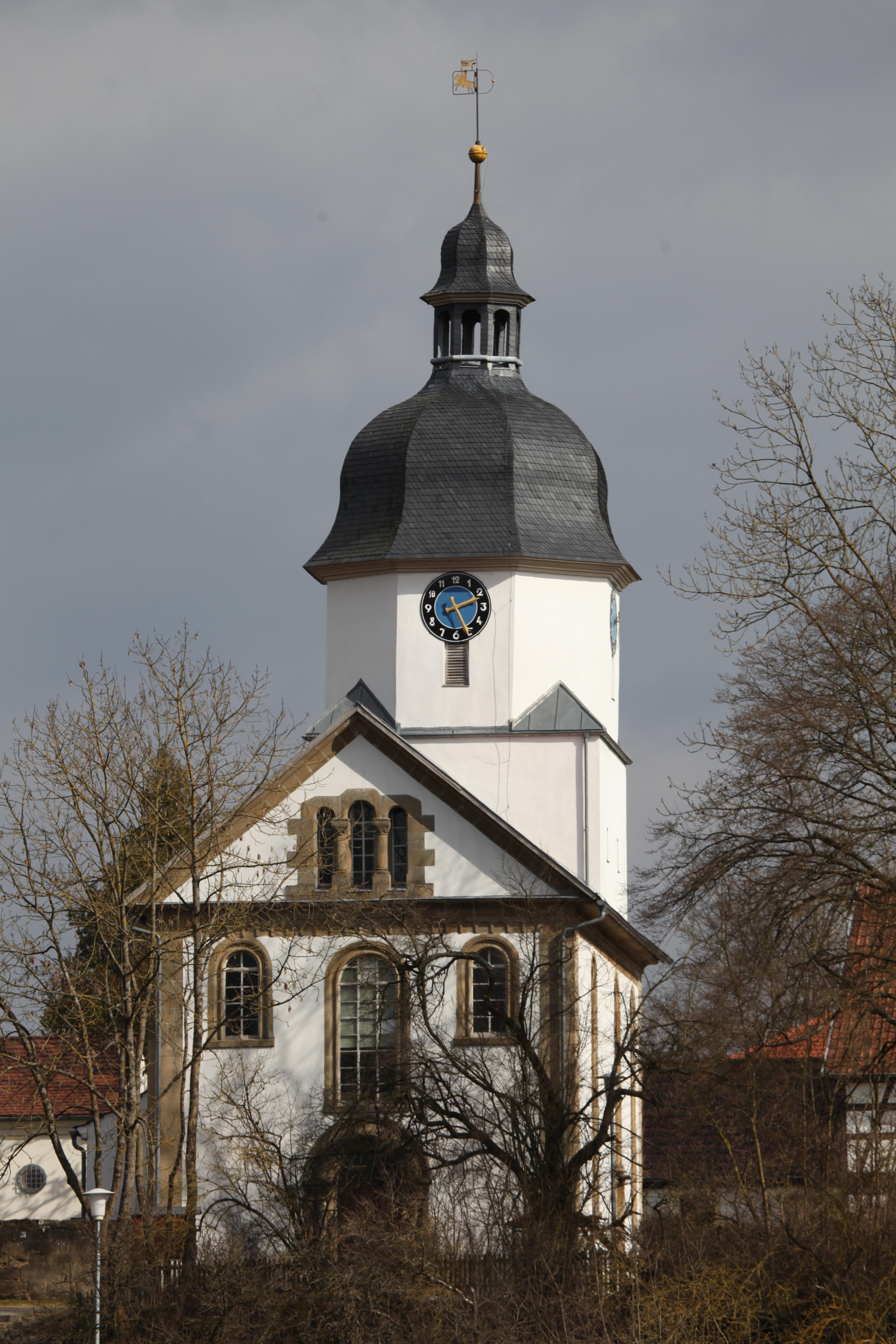 Evangelische Nikolauskirche in Heldritt, Landkreis Coburg